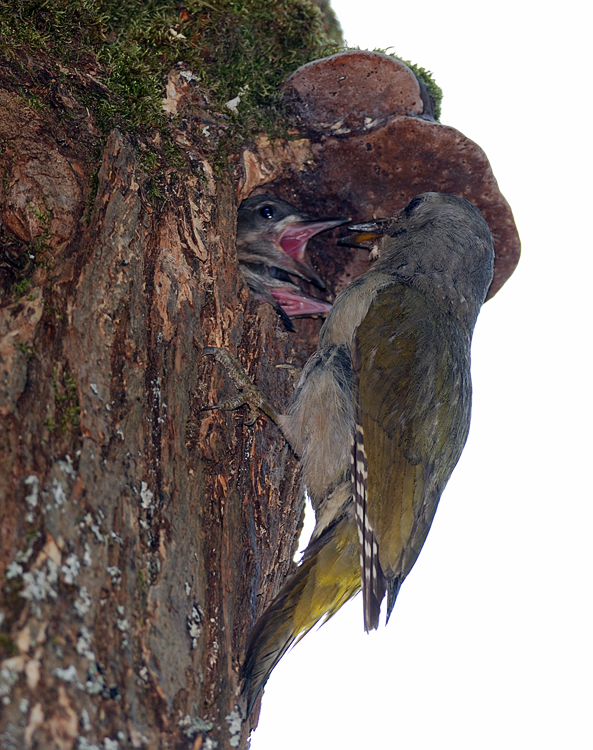 Žluna šedá při krmení mláďat. Lokalita: Tábor u řeky Lužnice